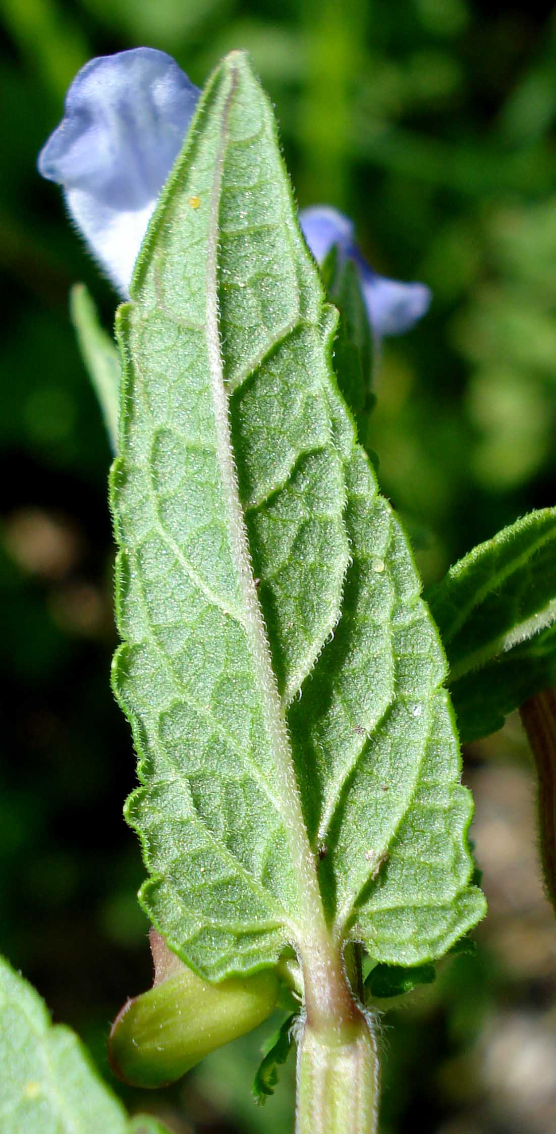 Scutellaria galericulata (Unterfranken, Germany)